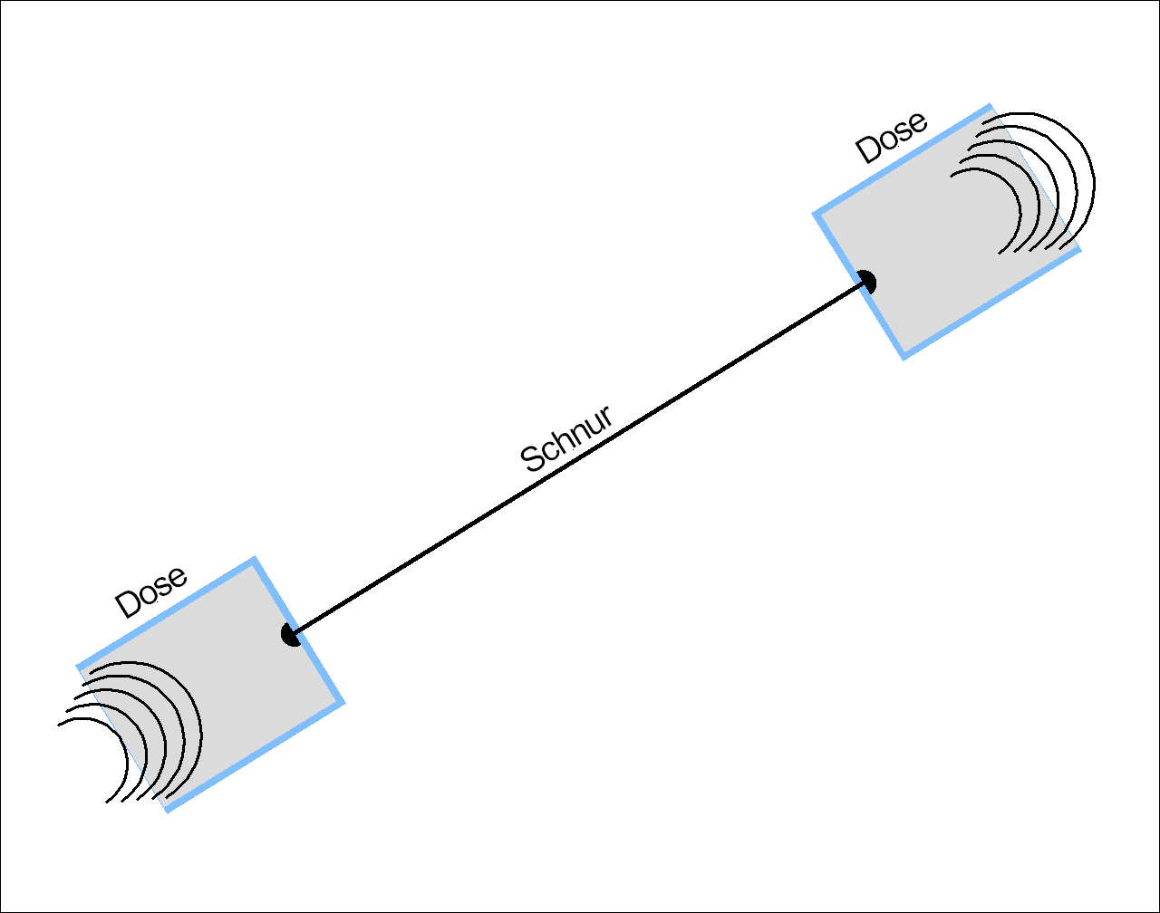 Schnurtelephon